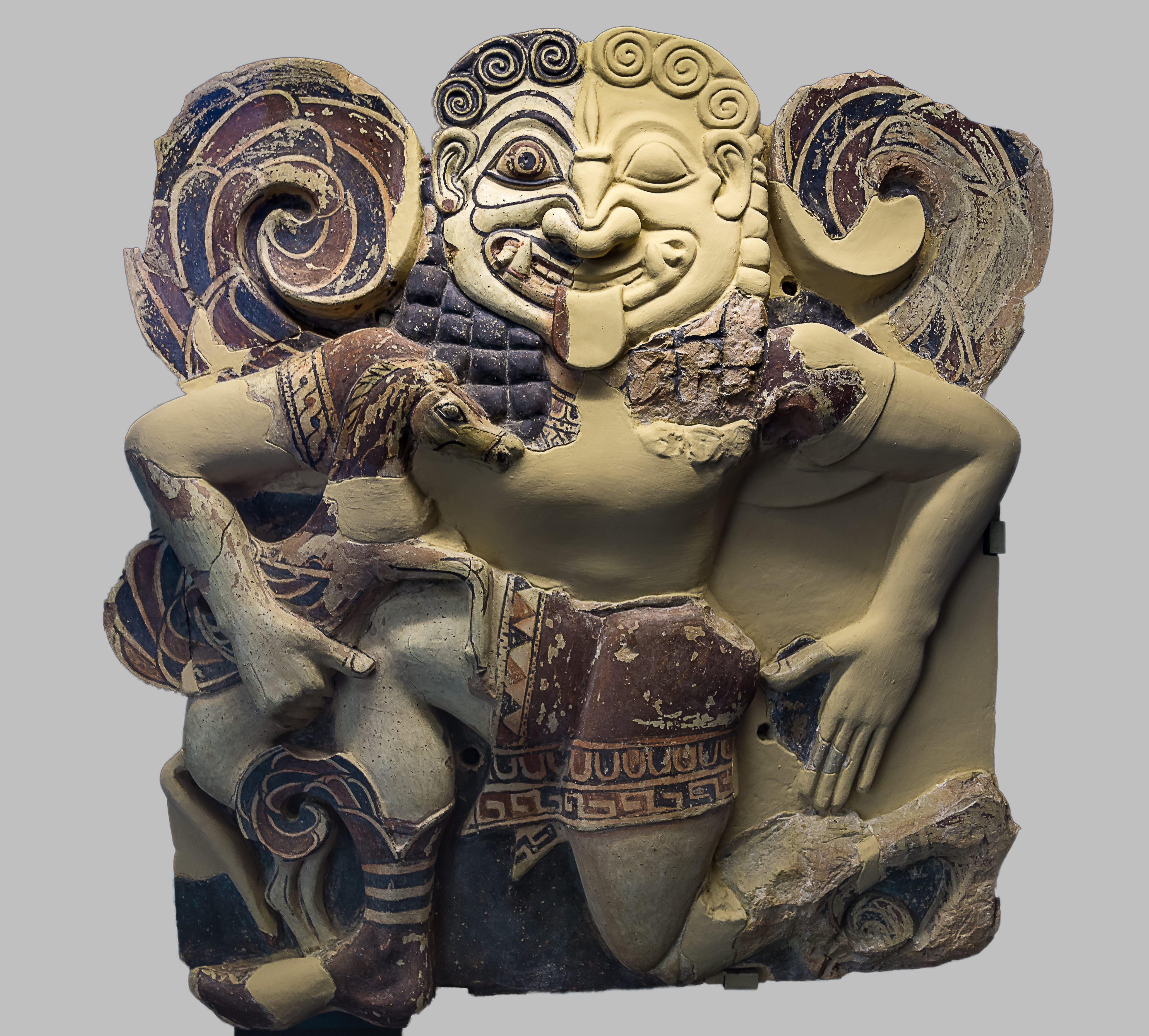 Terrakottaplakette, die eine geflügelte Gorgoneion darstellt, die in der schematischen archaischen Art läuft. In der rechten Hand hält sie Pegasus, das geflügelte Pferd, das laut Mythos aus dem ausgetretenen Blut der enthaupteten Medusa geboren wurde. Das Werk aus Syrakus wurde gegen Ende des 7. Jahrhunderts v. Chr. gefertigt